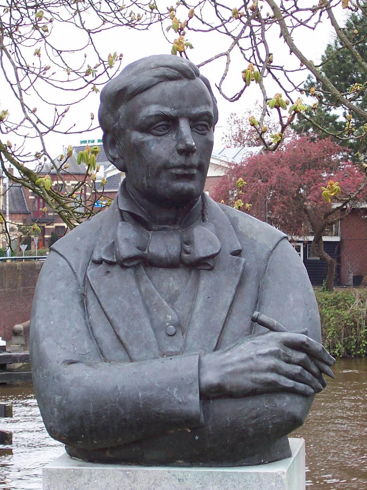 Ljouwert, boarstbyld fan Piet Paaltjens (François Haverschmidt), makke troch Jentsje Popma yn 1986.